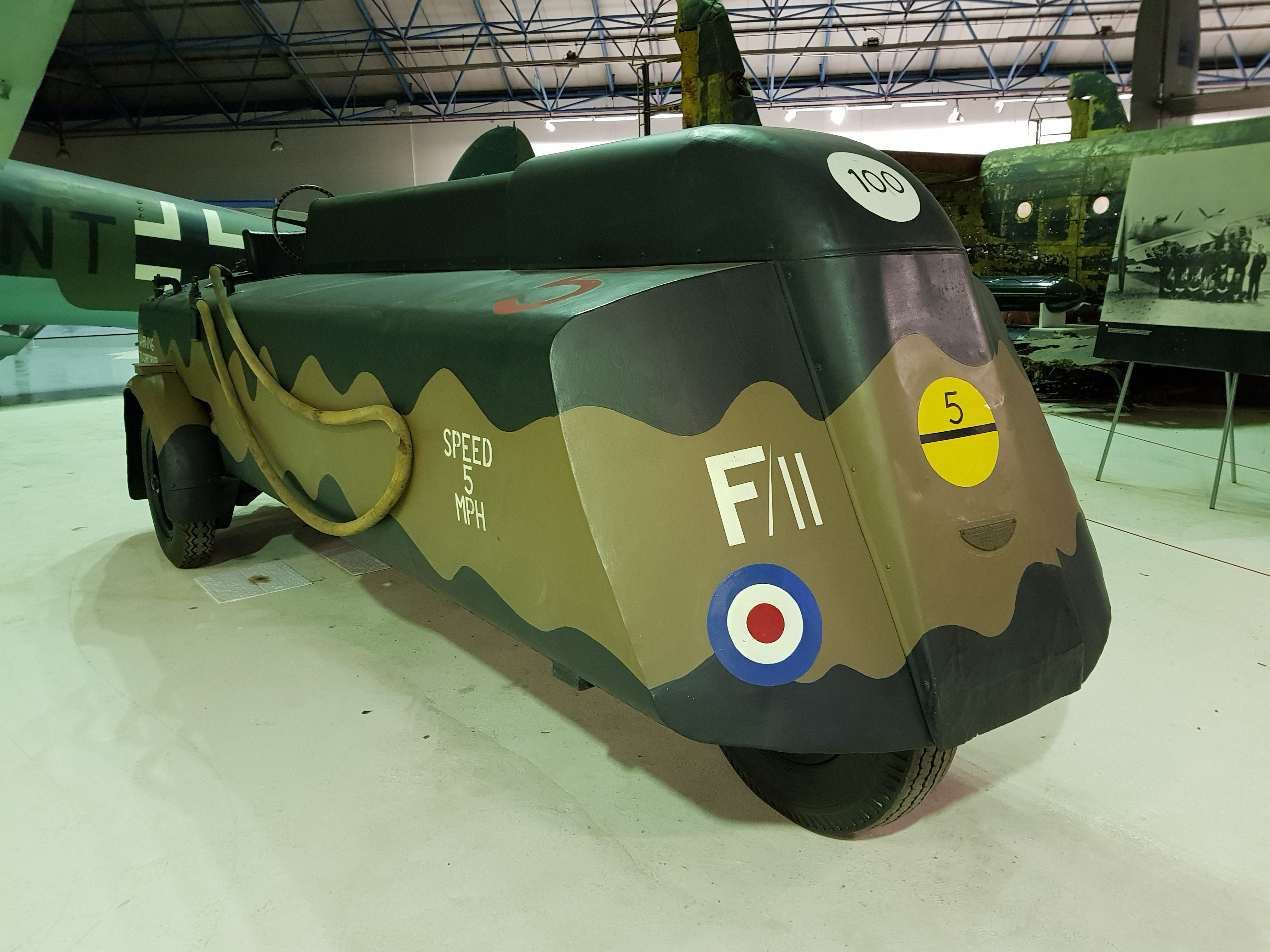 RAF Museum London, Hendon